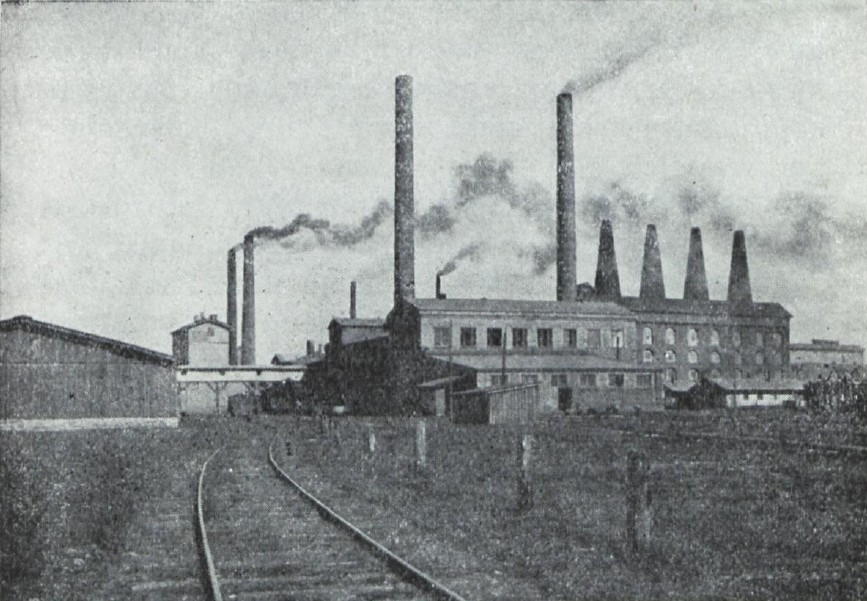 Kunda tsemendivabrik